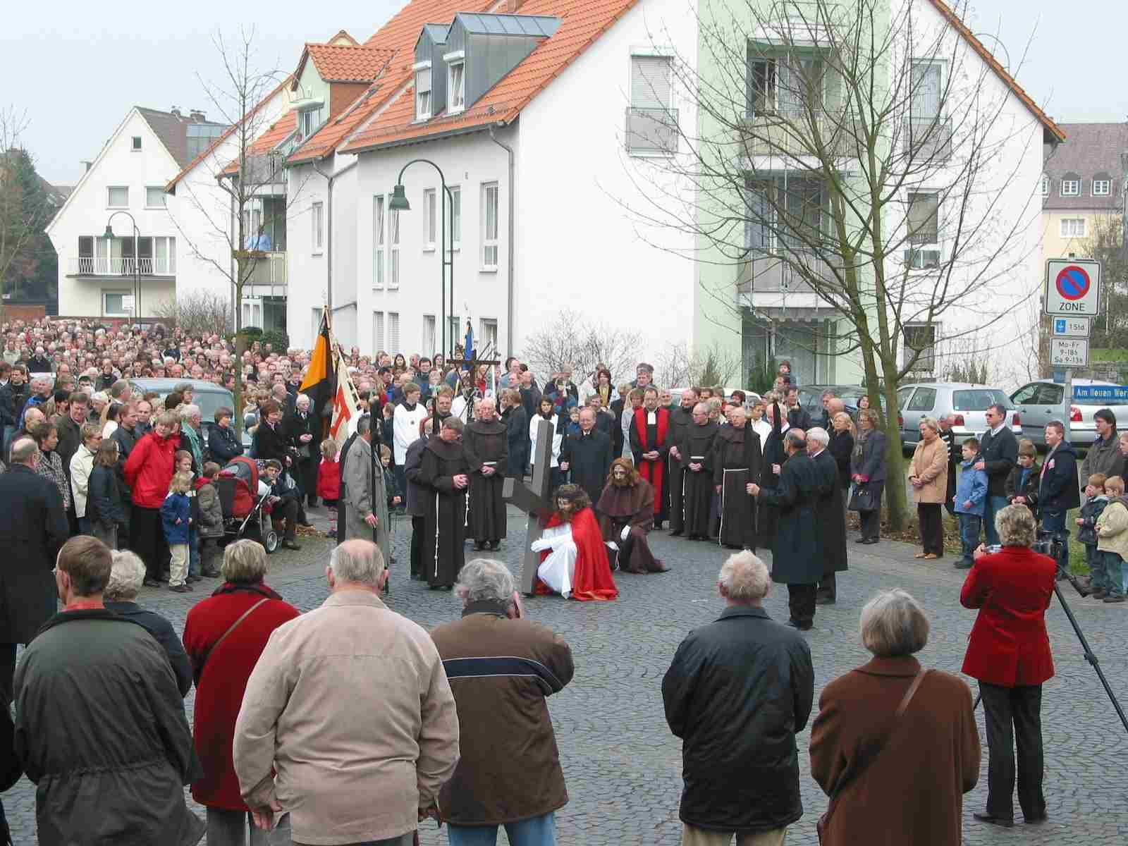 "Karfreitagsprozession Wiedenbrueck: Am Reckenberg"